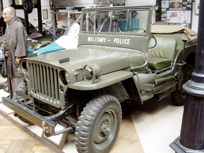 FORD-GPW-JEEP(ジープ),Fukuyama MOTOR and CLOCK MUSEUM